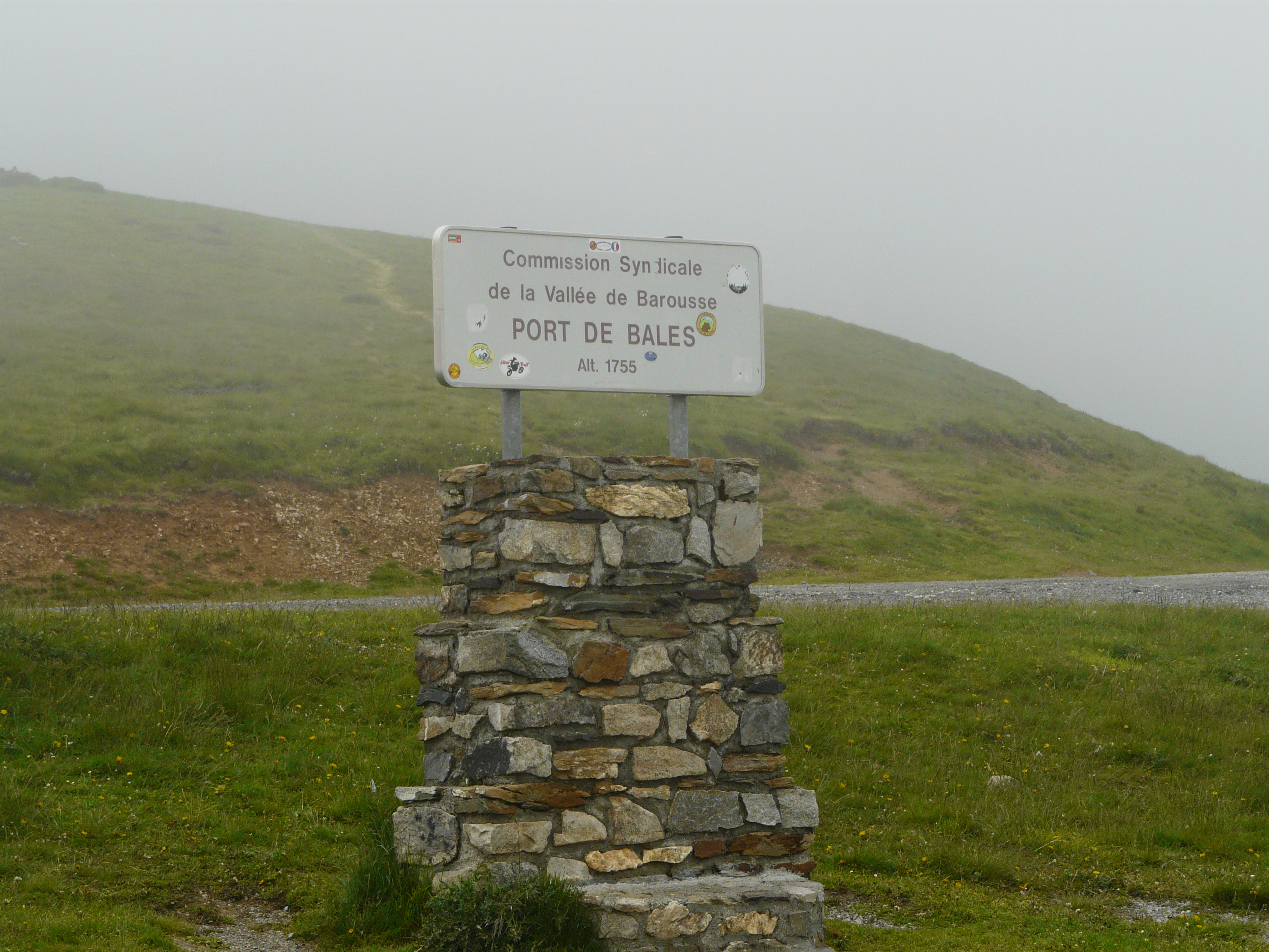 Le port de Balès dans le brouillard. C'est un col qui permet la relation entre la vallée d'Oueil (Haute-Garonne) et celle de la Barousse (Hautes-Pyrénées).